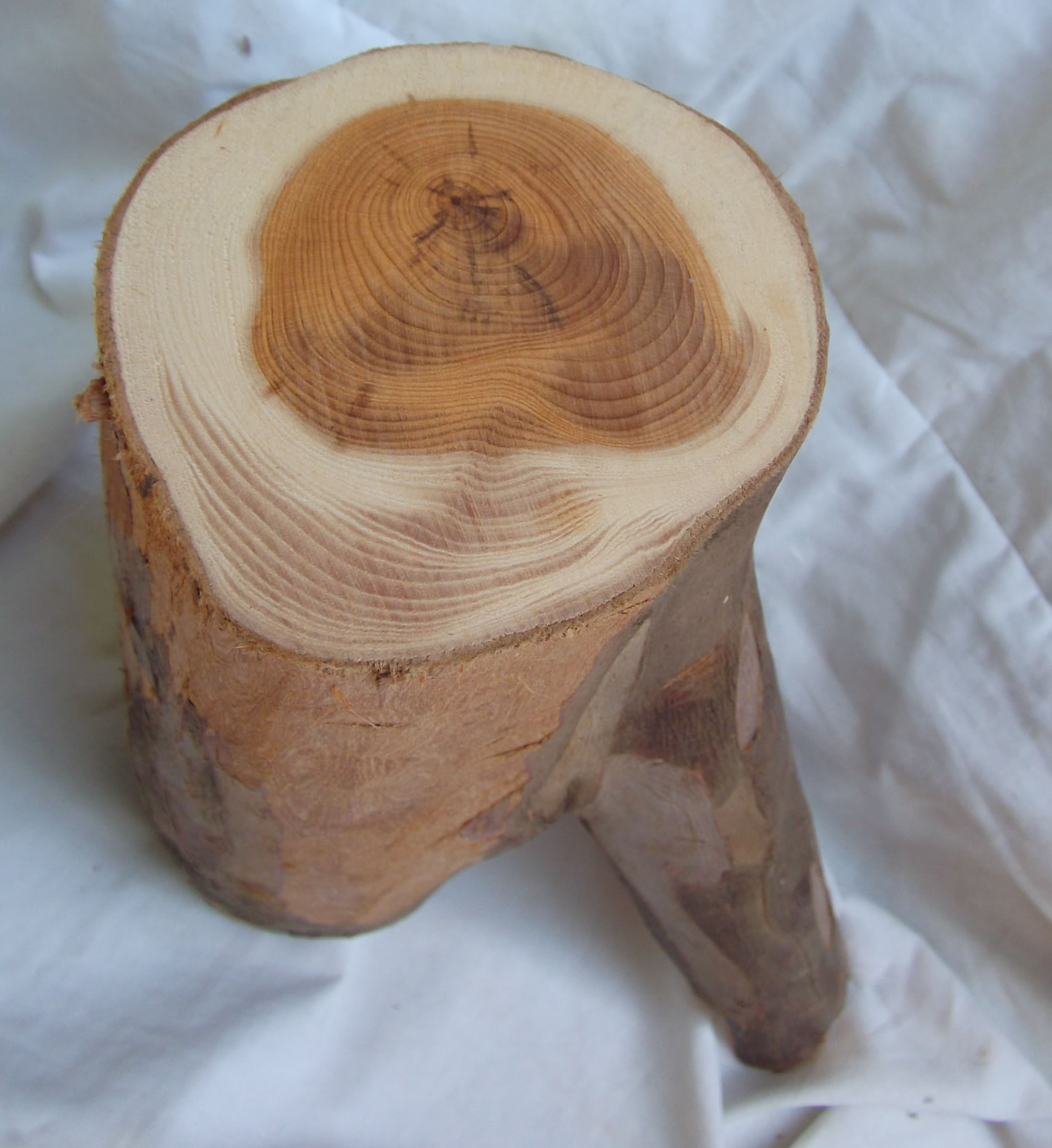 Coeur et aubier de l'if